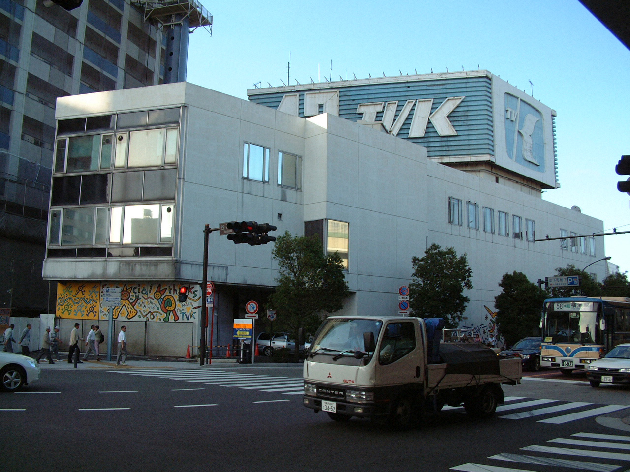 テレビ神奈川山下町旧社屋。すでに移転が終わって、マンション建設が始まろうとしている。